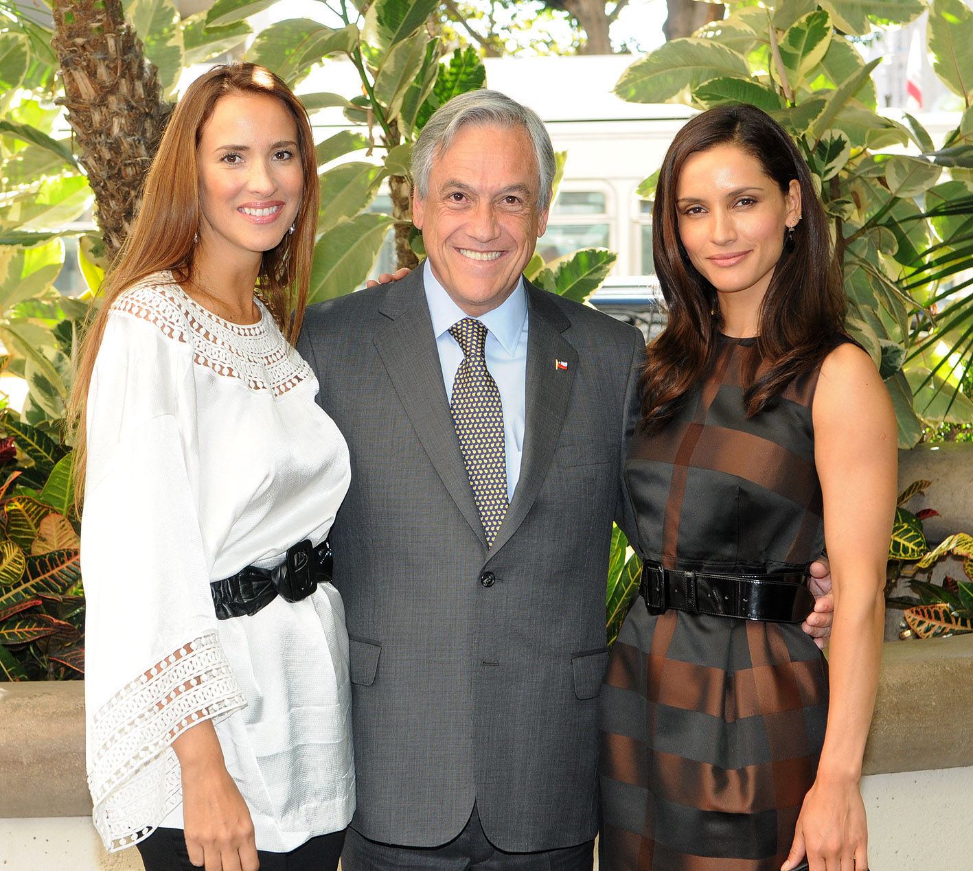 El Presidente de la República, Sebastián Piñera, participa en el desayuno de trabajo empresarial “Chile-California, oportunidades de negocios”, organizado por Pro-Chile y la Cámara de Comercio de Los Ángeles. En la foto Angélica Castro, Sebastian Piñera, Leonor Varela.